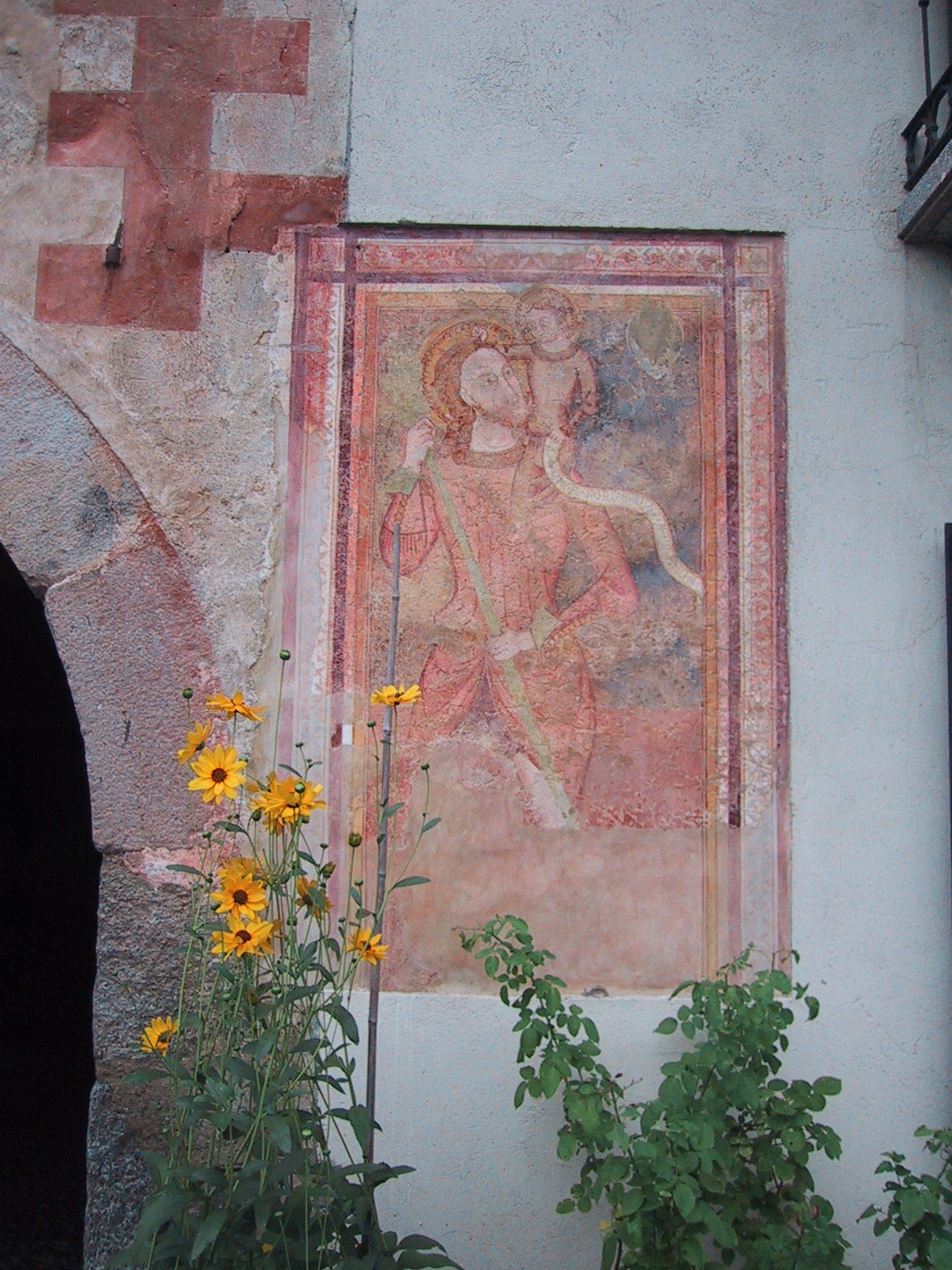 Wandbild an einem Haus in Origlio im historischen Dorf, Kanton Tessin